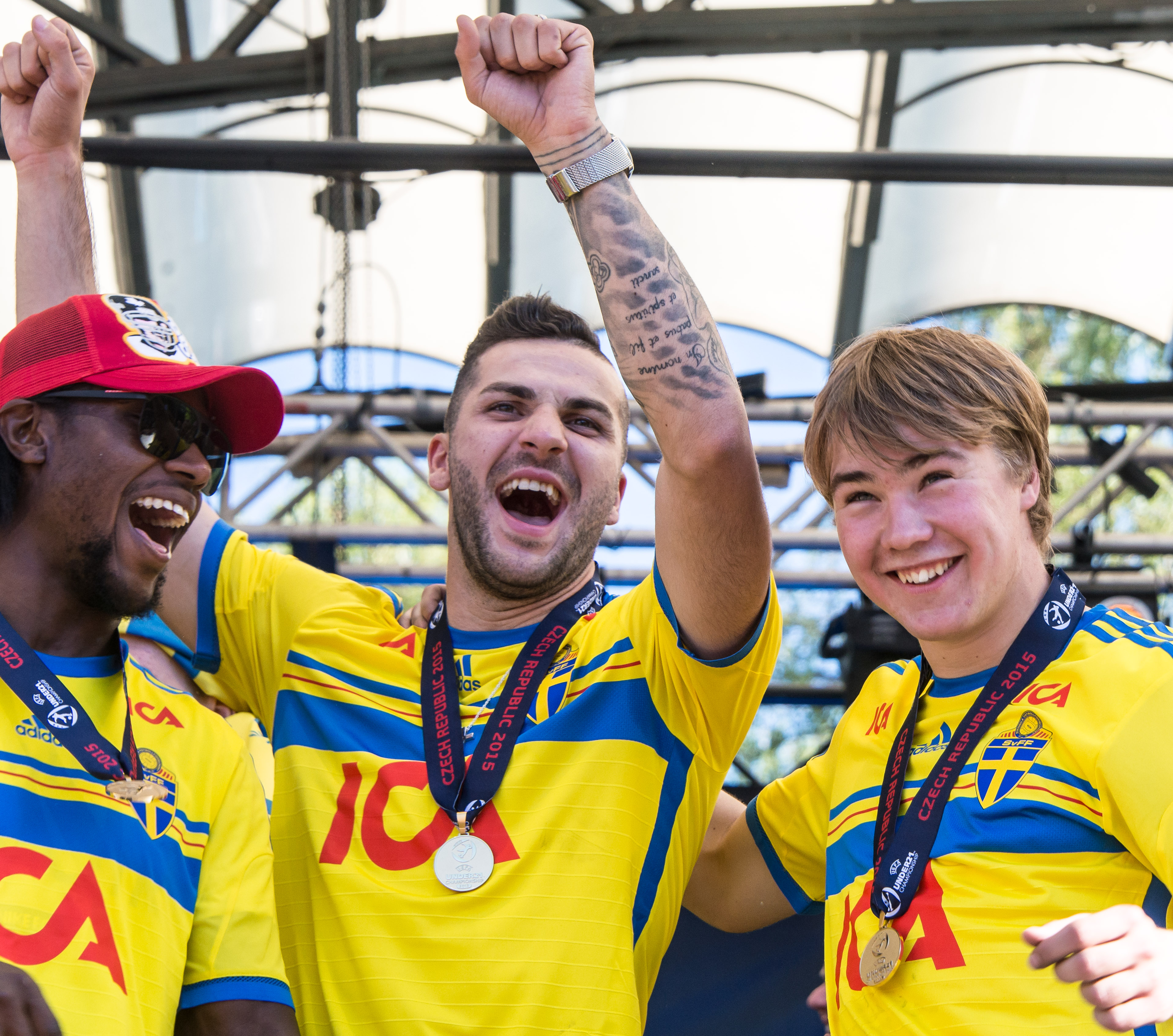 Joseph Baffo, Mikael Ishak, Simon Tibbling och U21-mästarna firas i Kungsträdgården i Stockholm den 1 juli 2015.